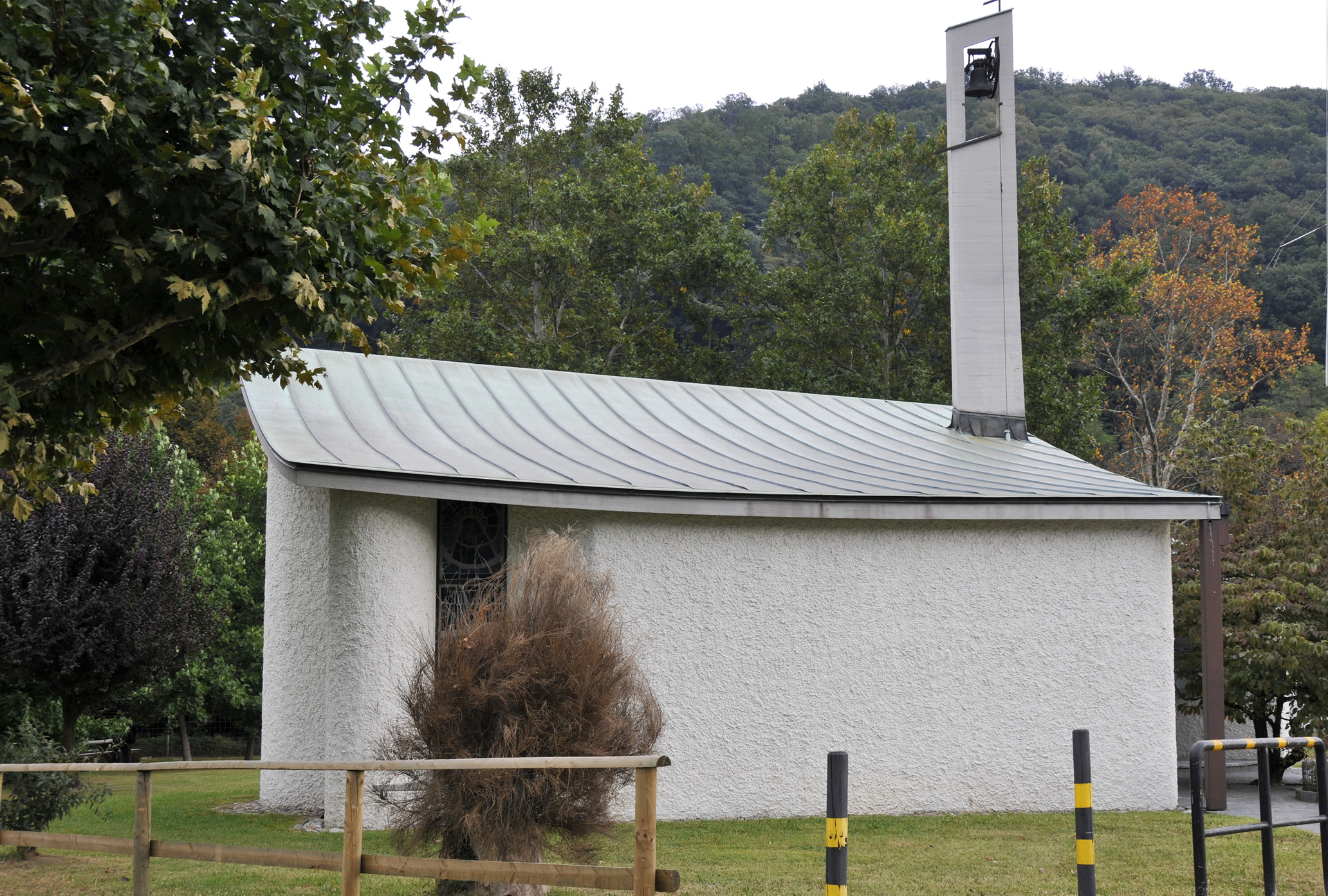 Oratorio della Madonna deiMulini ai Mulini di Bioggio